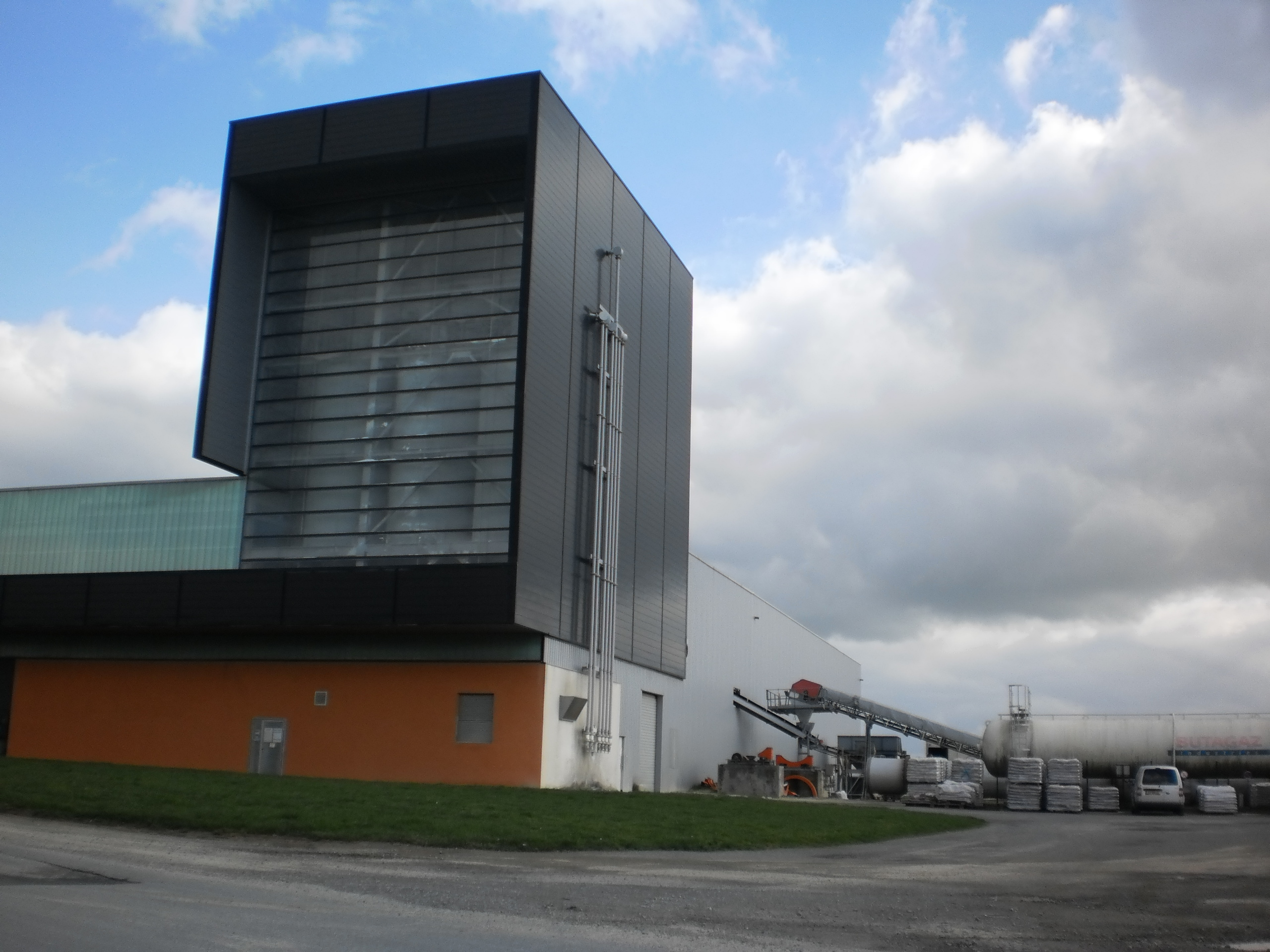 Vritz (Loire-Atlantique, France) - Carrière